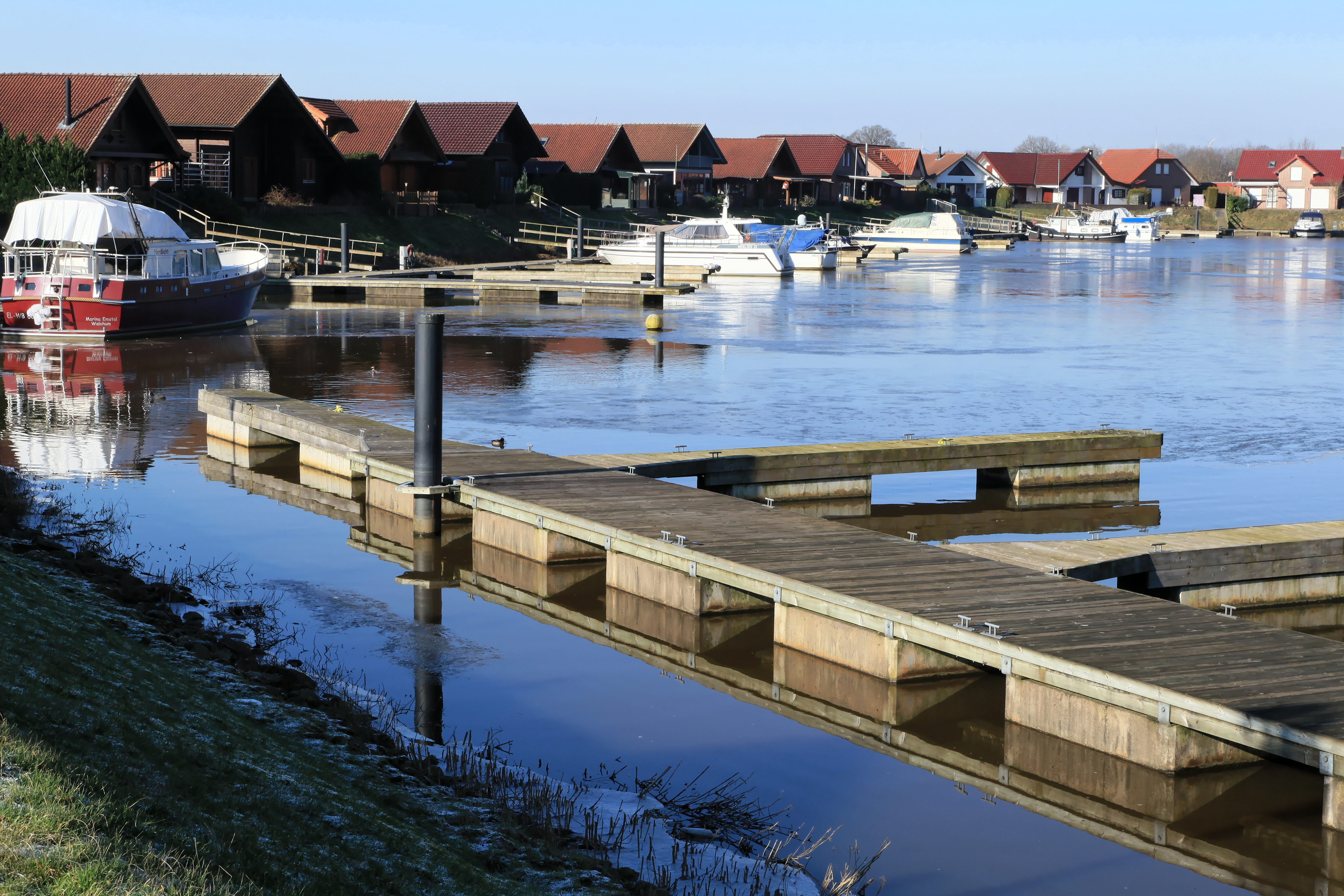 Marina im Marinapark, Steinbilder Straße in Walchum